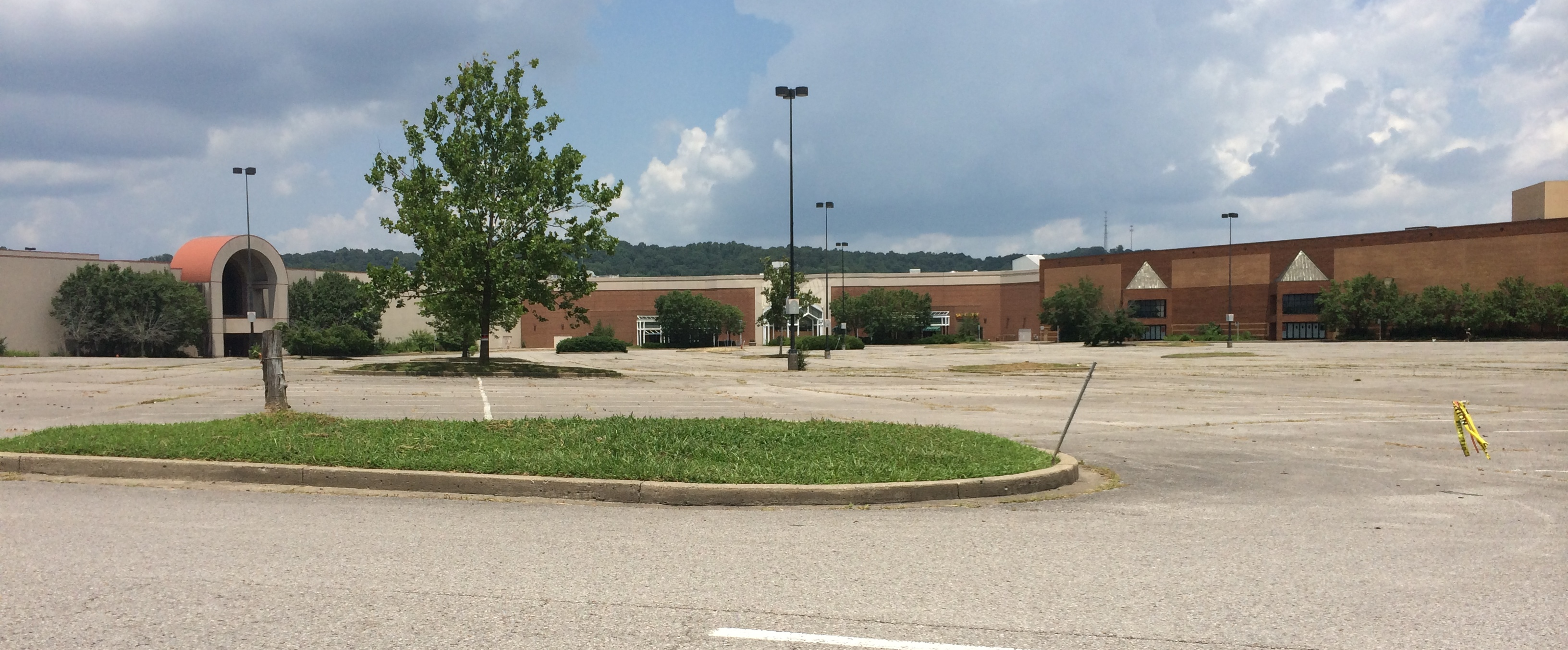 Bellevue Center Bellevue (Nashville), TN July 2015